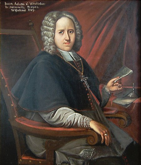 Jan Adam hrabě Wratislav z Mitrovic (1677 – 1733 )